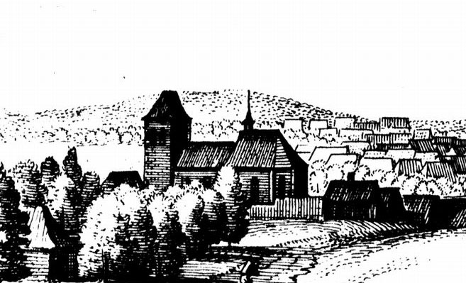 St. Andreaskirche Ausschnitt aus der Ortsansicht Cloppenburgs von Matthäus Merian 1647